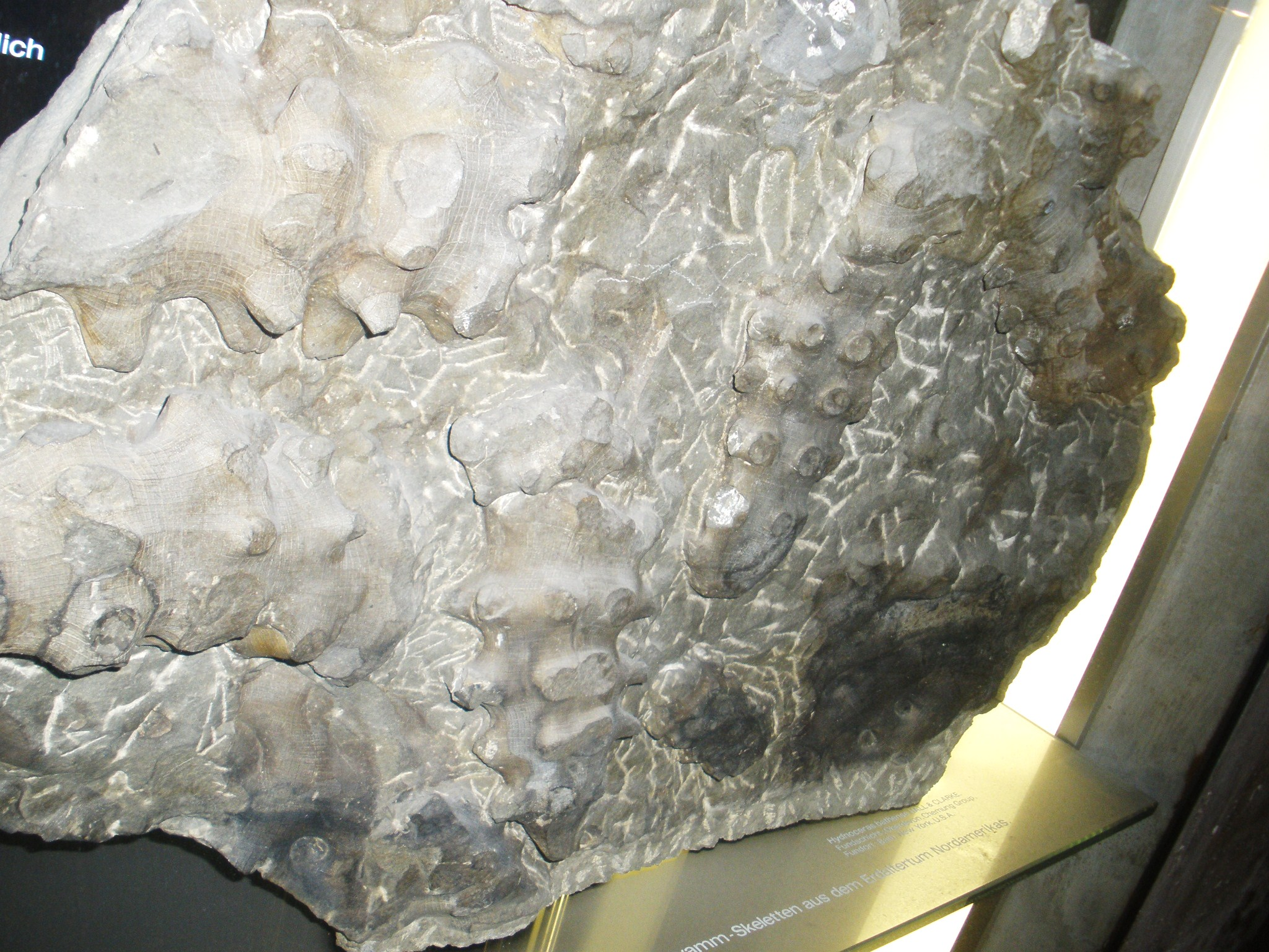 Fossil of Hydnoceras, an extinct coral- Took the photo at Senckenberg Museum of Frankfurt